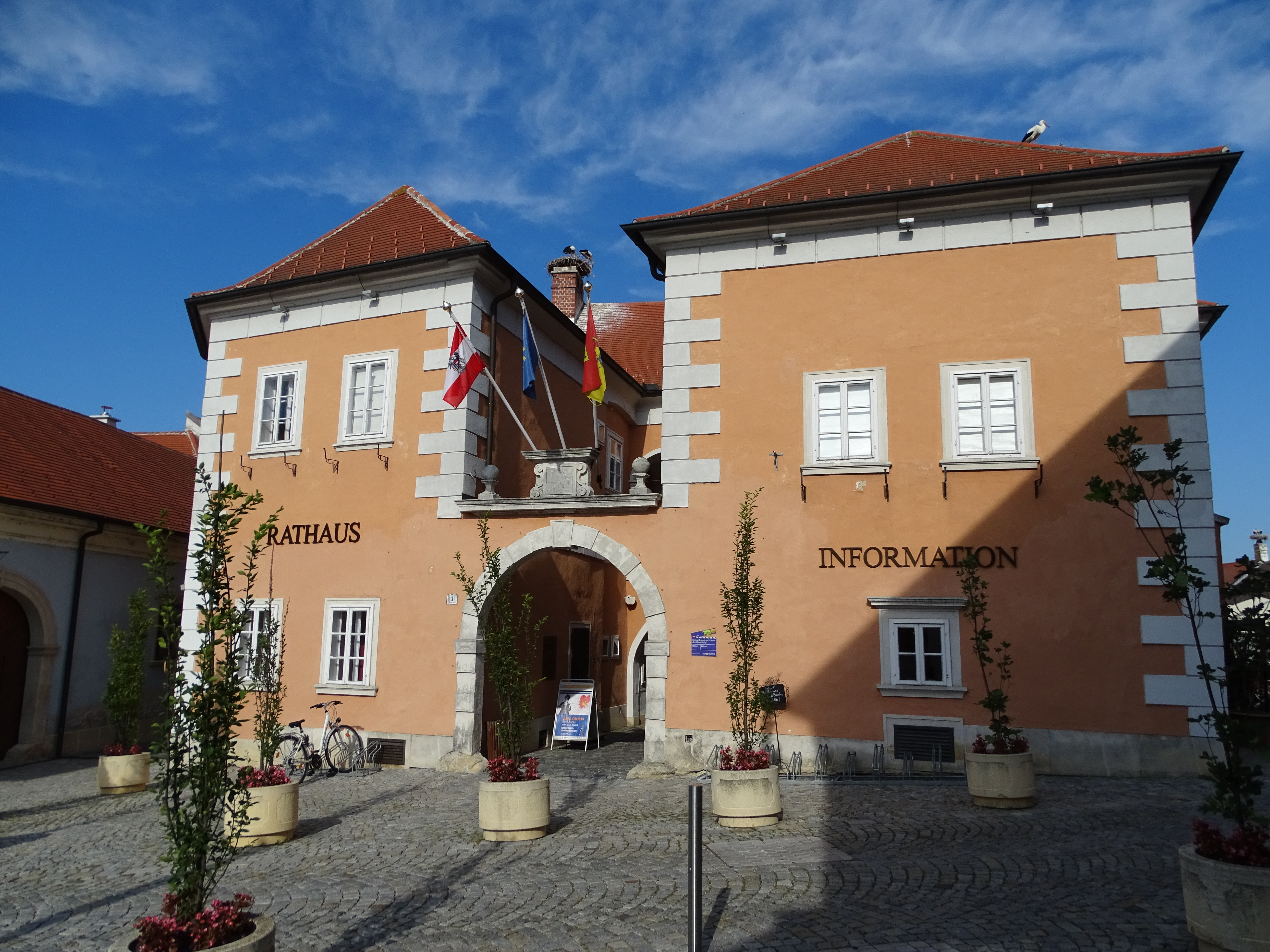 Das Rathaus von Rust im Burgenland